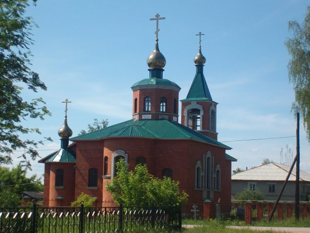 Храм в честь святого пророка Божиего Илии, с.Филинское, Нижегородская обл., Россия